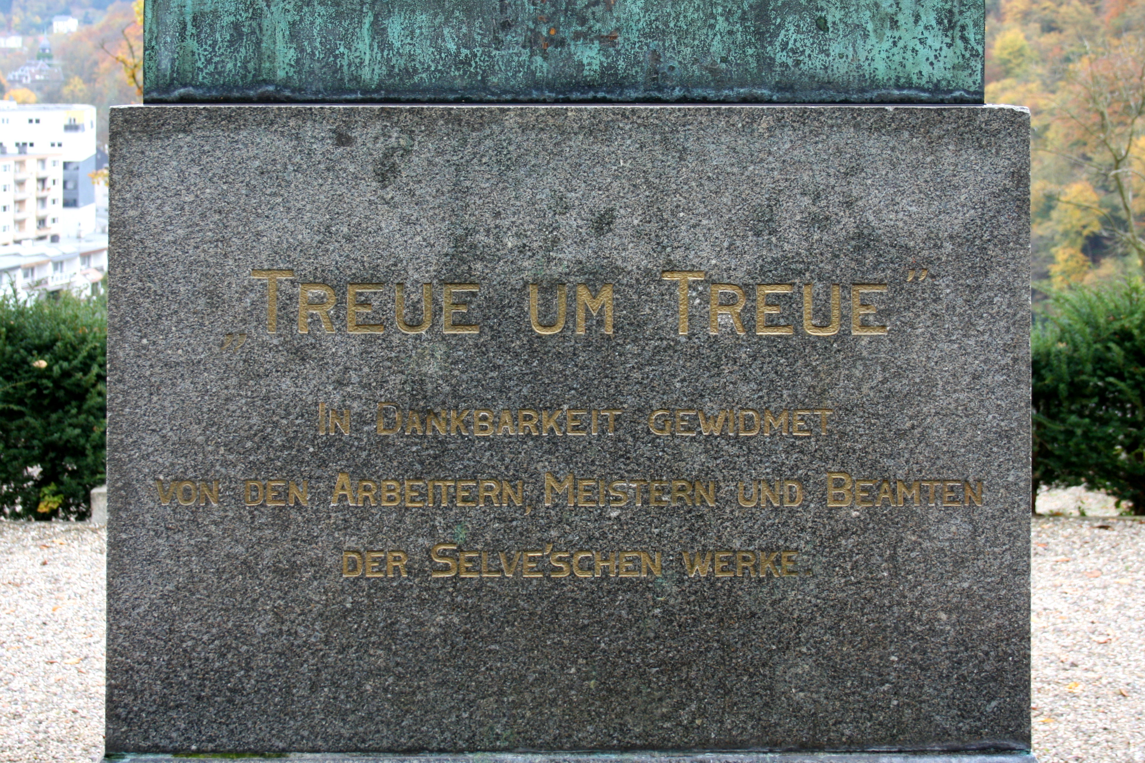 Gustav-Selve-Denkmal in Altena